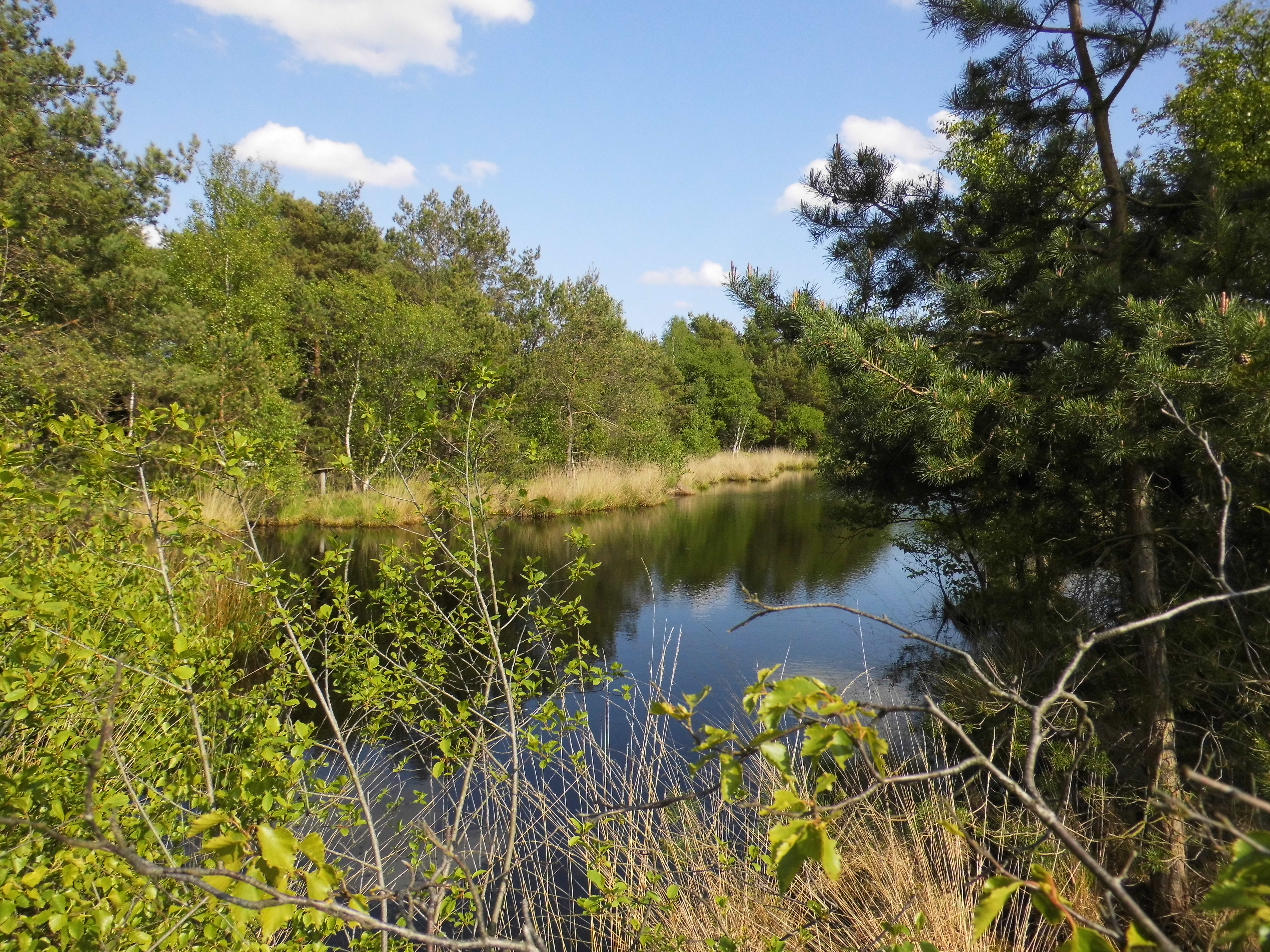 Moorsee im Fintlandsmoor